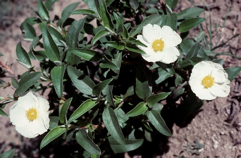 Cistus laurifolius subsp. laurifolius